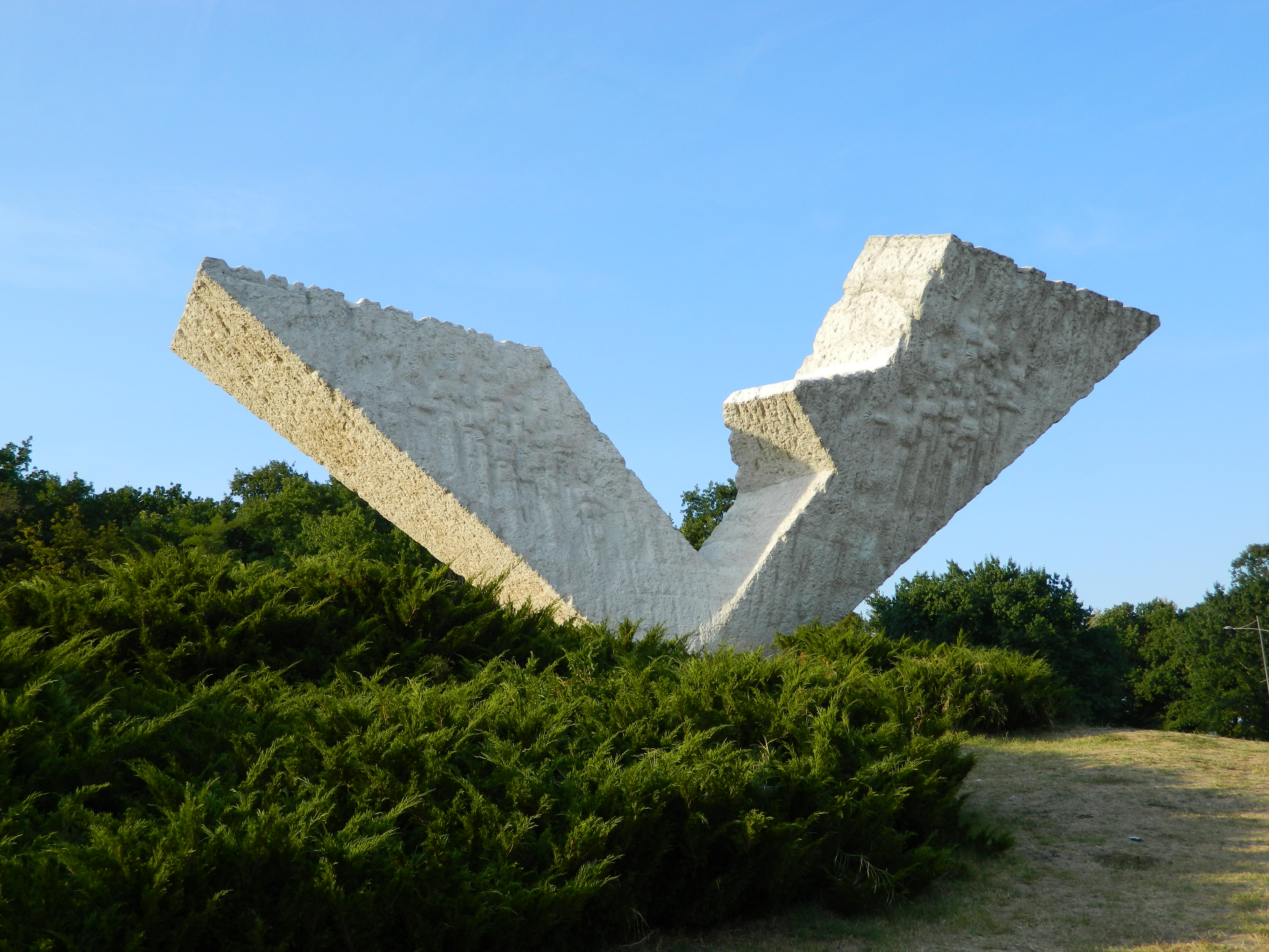 Spomenik streljanim đacima i profesorima "Peto tri"